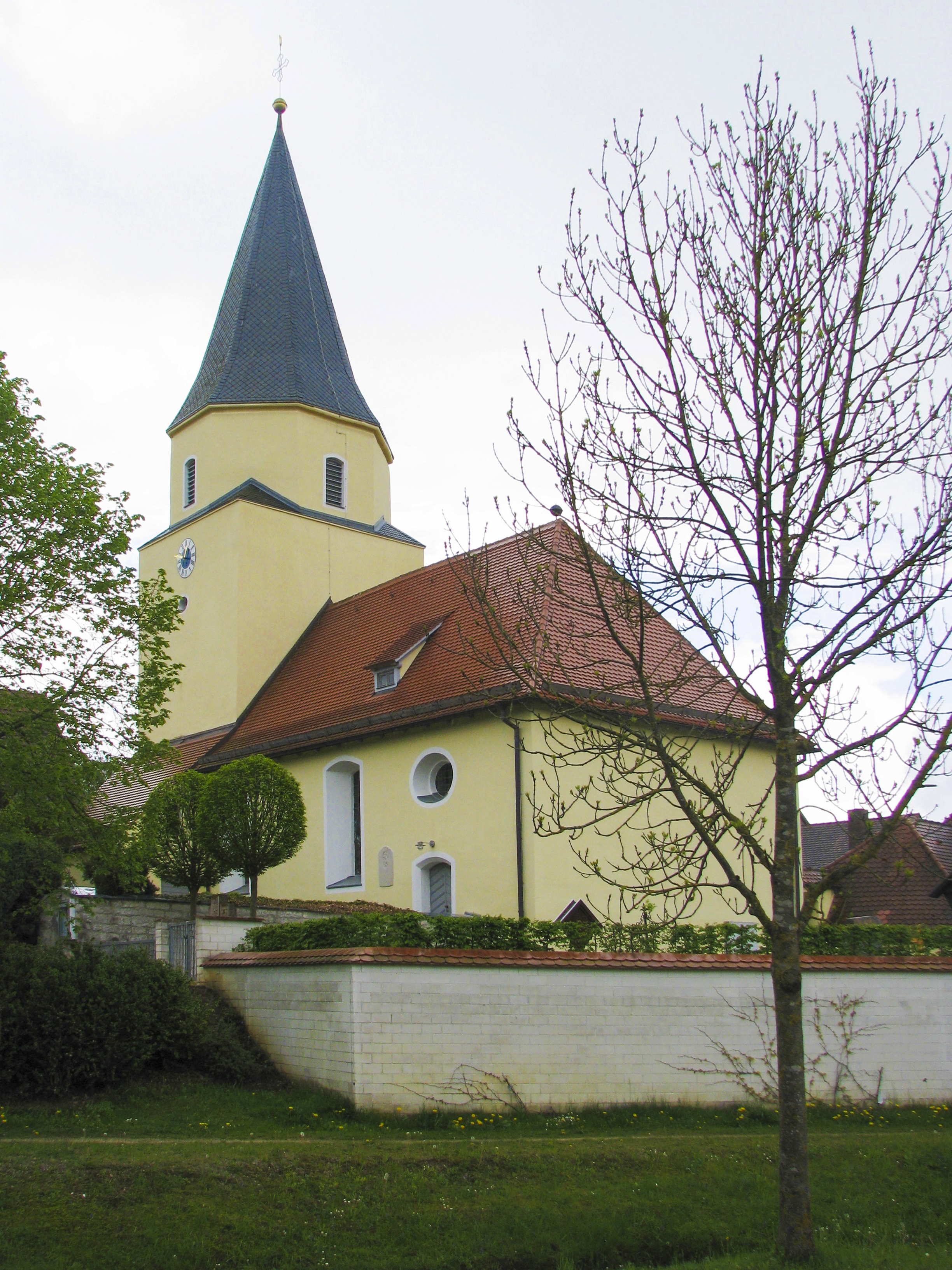 Hausheim, Ortsteil von Berg bei Neumarkt i. d. Opf., Pfarrkirche St. Peter und Paul